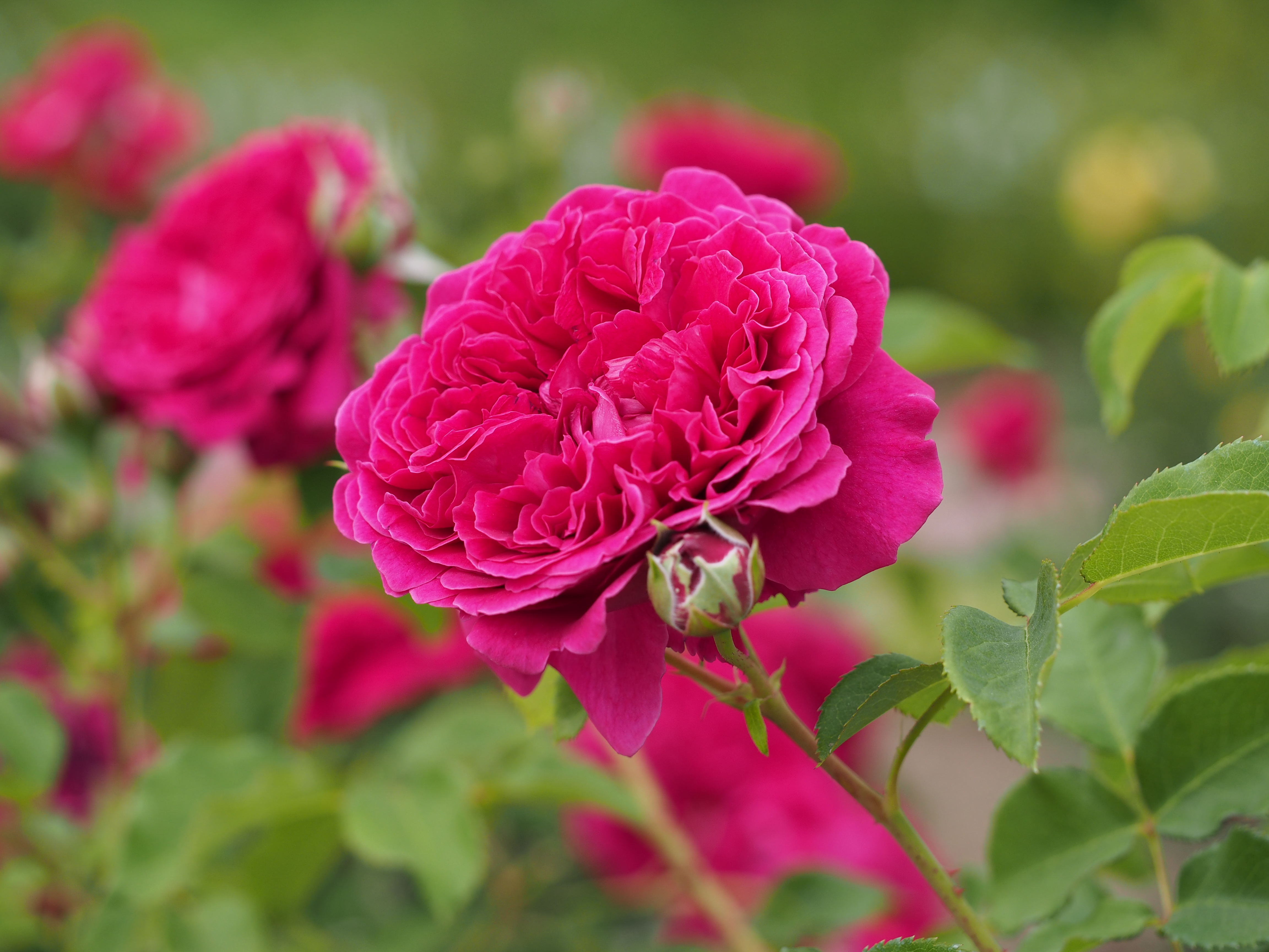 Rose, William Shakespeare 2000, バラ, ウィリアム シェイクスピア 2000, Shrub rose シュラブ United Kingdom イギリス Austin 2000